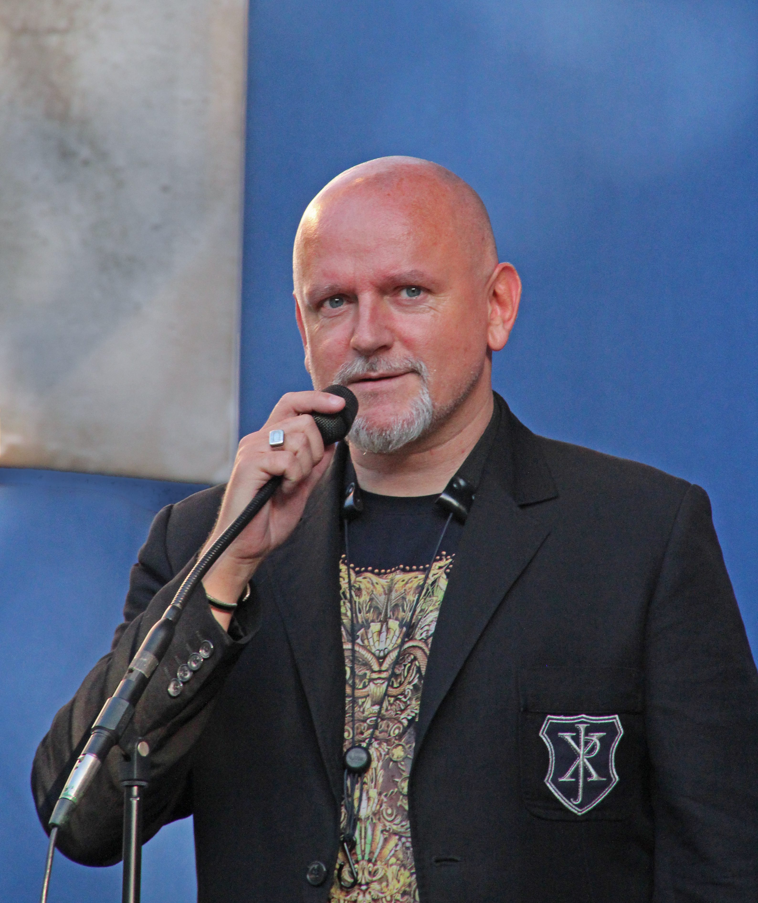 Bildinhalt: Adam Pierończyk bei einem Auftritt mit seinem Quartett im Palmengarten Aufnahmeort: Frankfurt am Main, Deutschland Die dargestellte Person wurde bei einem öffentlichen Auftritt fotografiert.